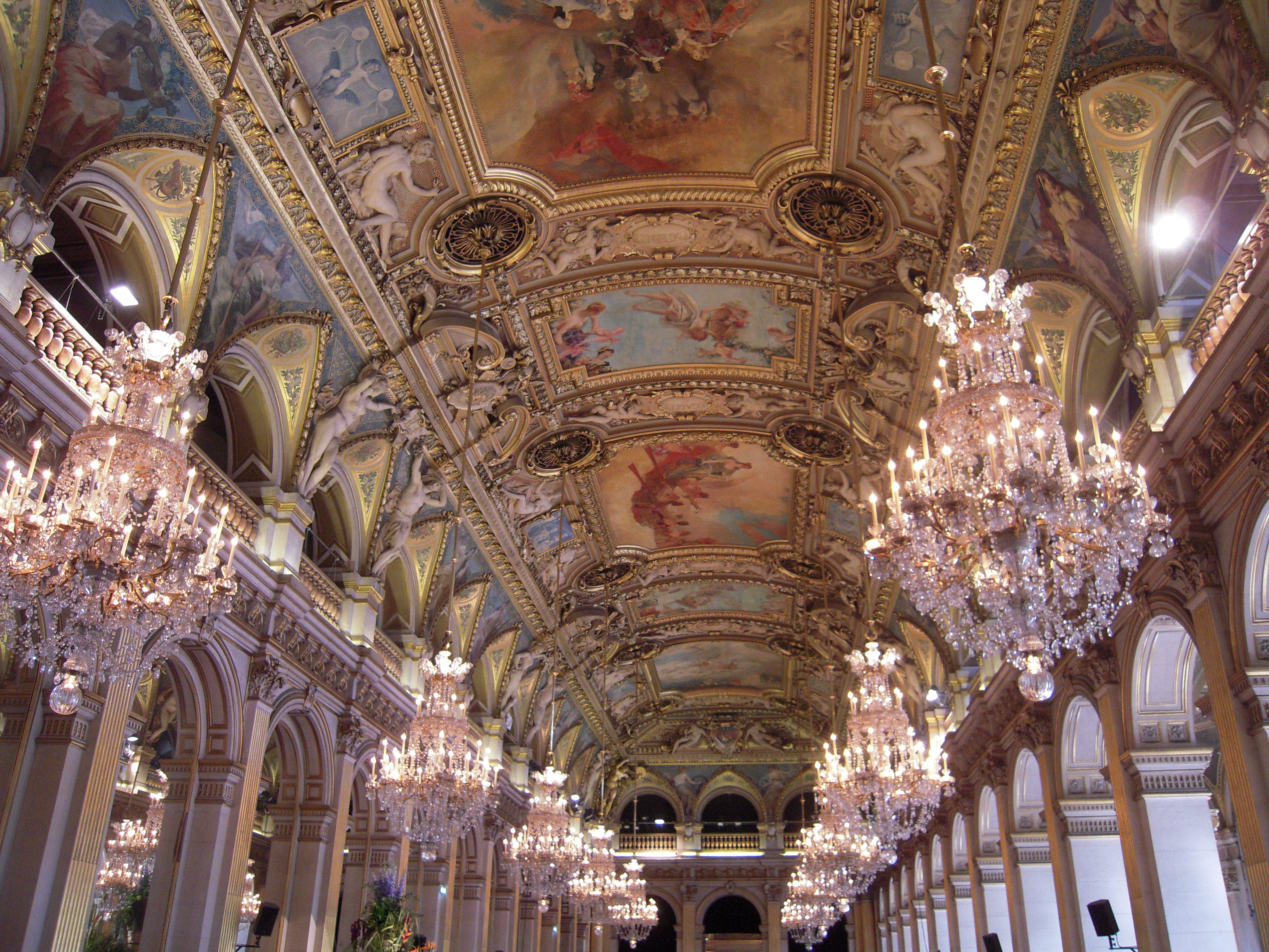 Le plafond de la salle des fêtes de l'Hôtel de ville de Paris